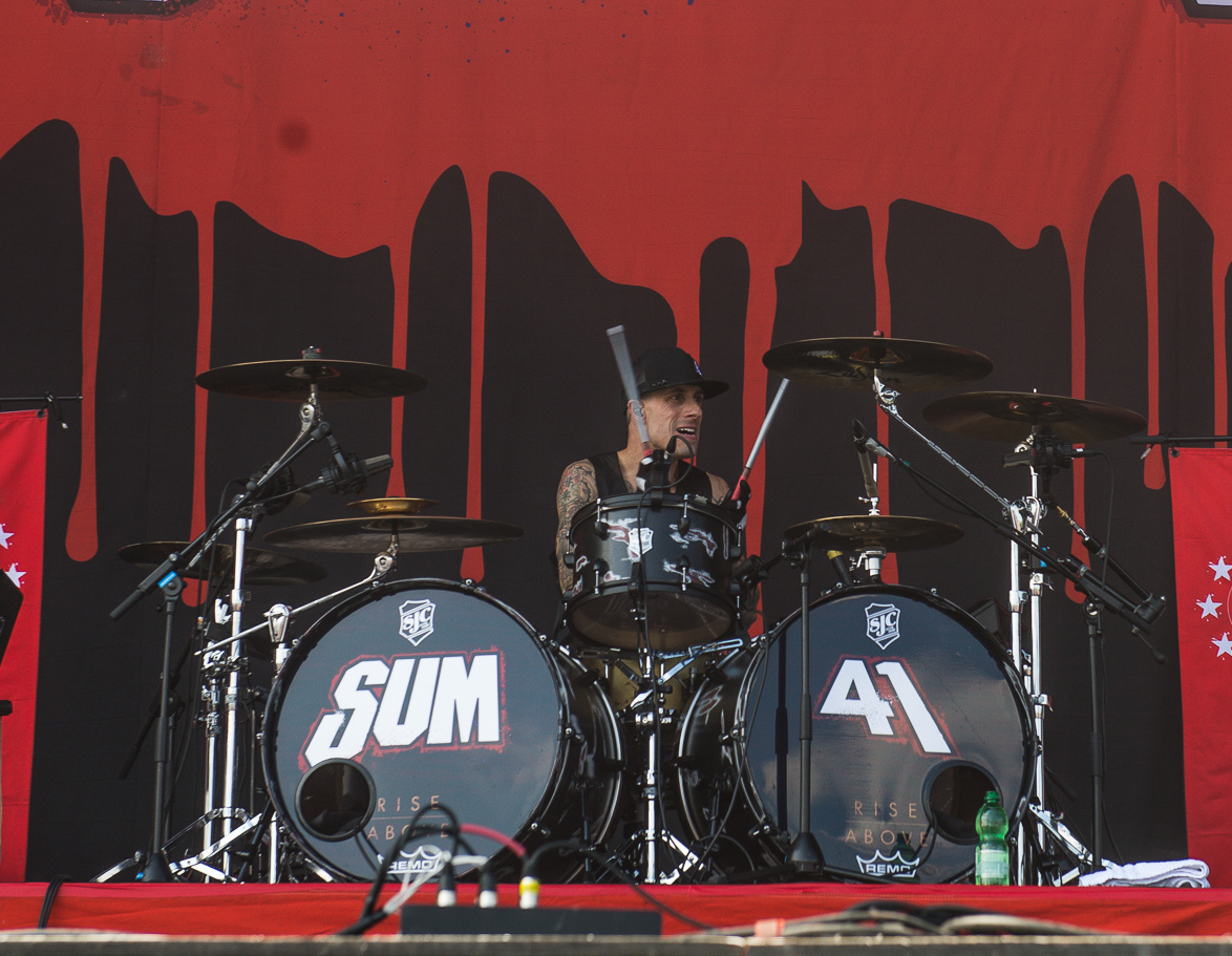 ARGO-Konzerte,Frank Zummo,Konzert,Livekonzert,Livemusik,Musik,RiP,Rock im Park 2017,Sum 41,Zeppelin Stage